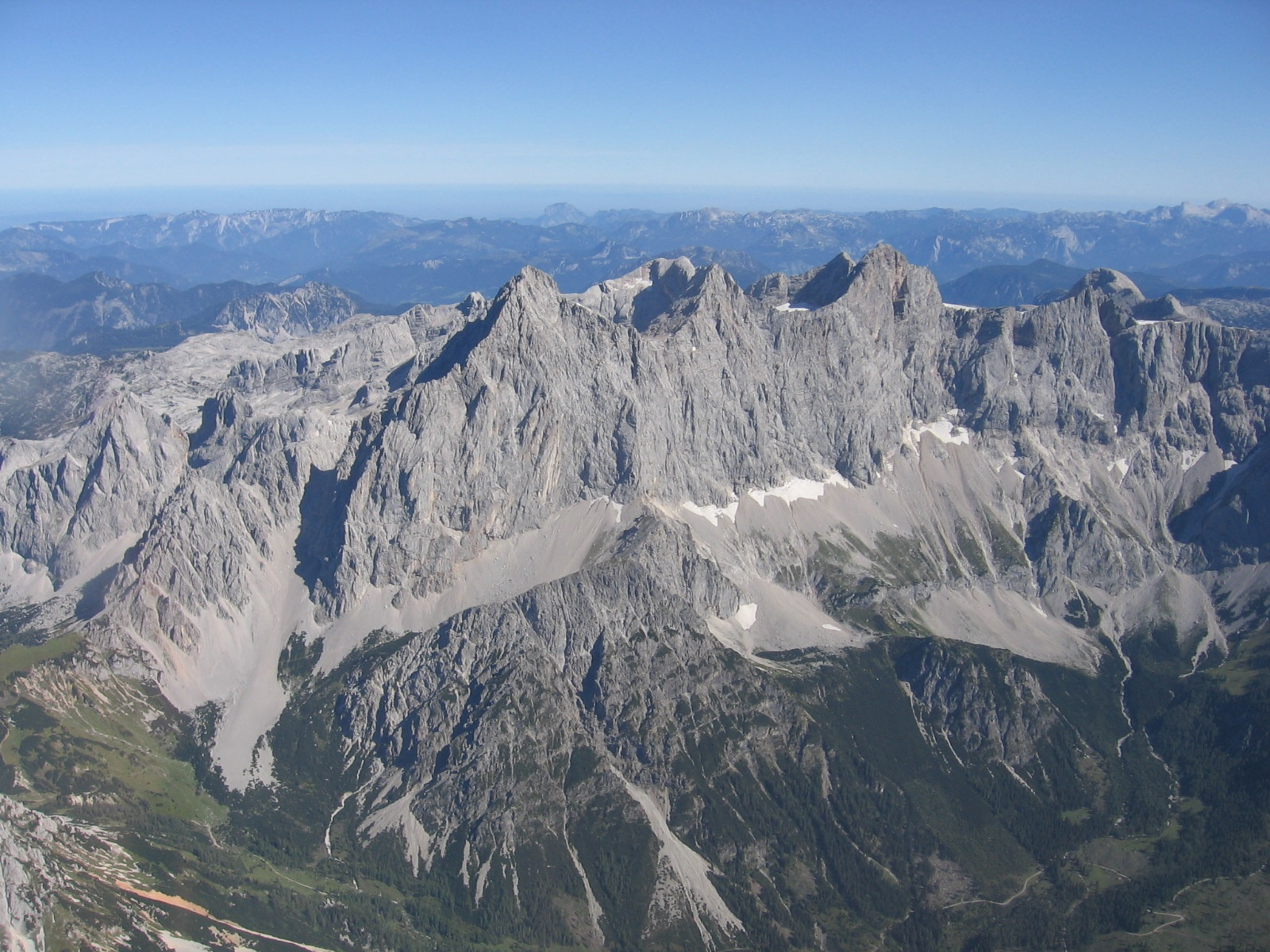 Luftaufnahme vom Dachstein